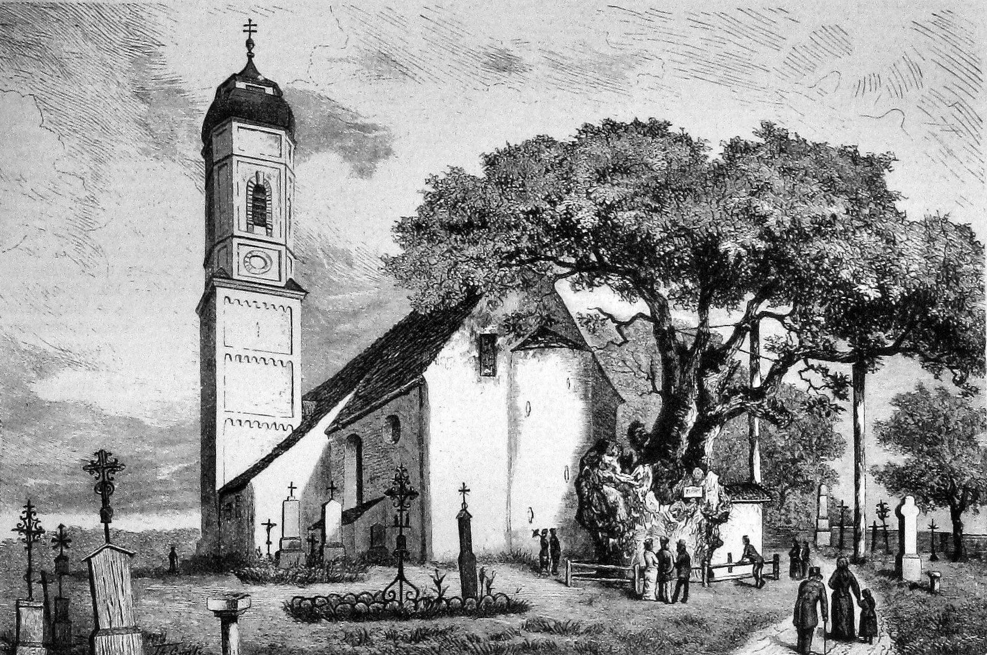 Edignalinde und Kirche St. Sebastian in Puch, Stadt Fürstenfeldbruck